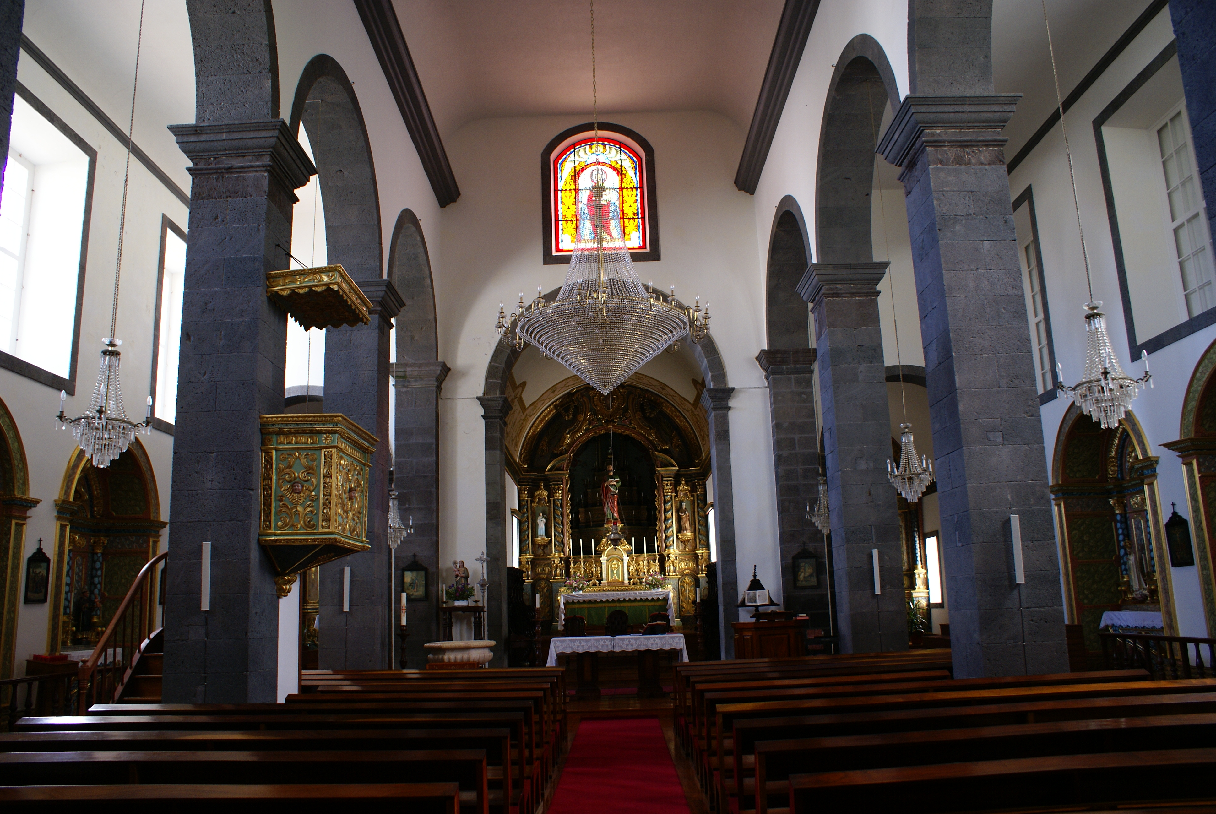 Igreja de São Mateus, nave central, vila da Praia, ilha Graciosa, Açores, Portugal